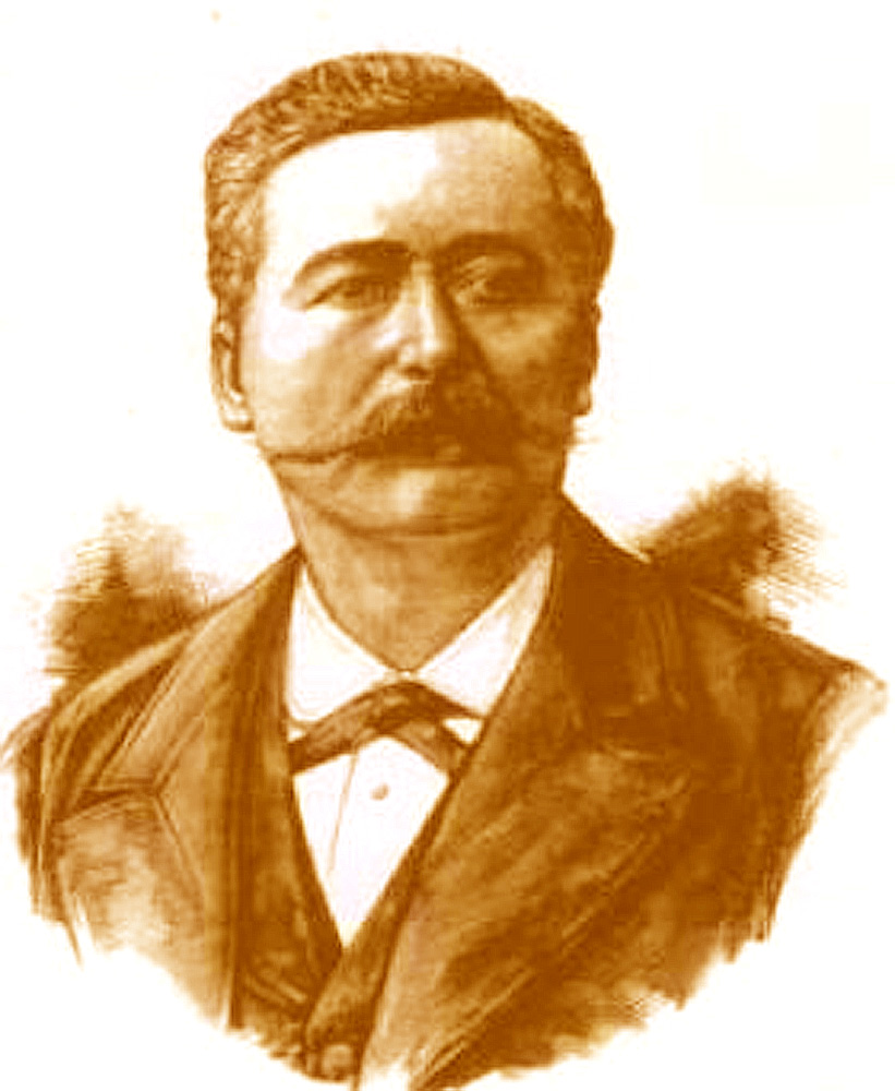 Joseph Rumillet-Charretier litho